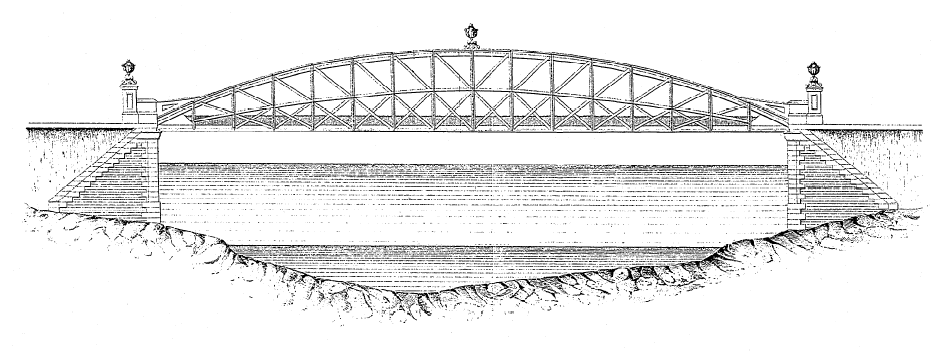 Planos del entonces llamado "Puente de Prado" sobre el Pisuerga en Valladolid (hoy el Puente Colgante), publicados por la Revista de Obras Públicas (vol. XIV, núm. 12) el 15 de junio de 1866, un año después de su inauguración.